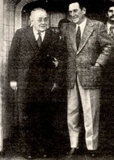 Juan Perón y Ricardo Balbín juntos. Argentina